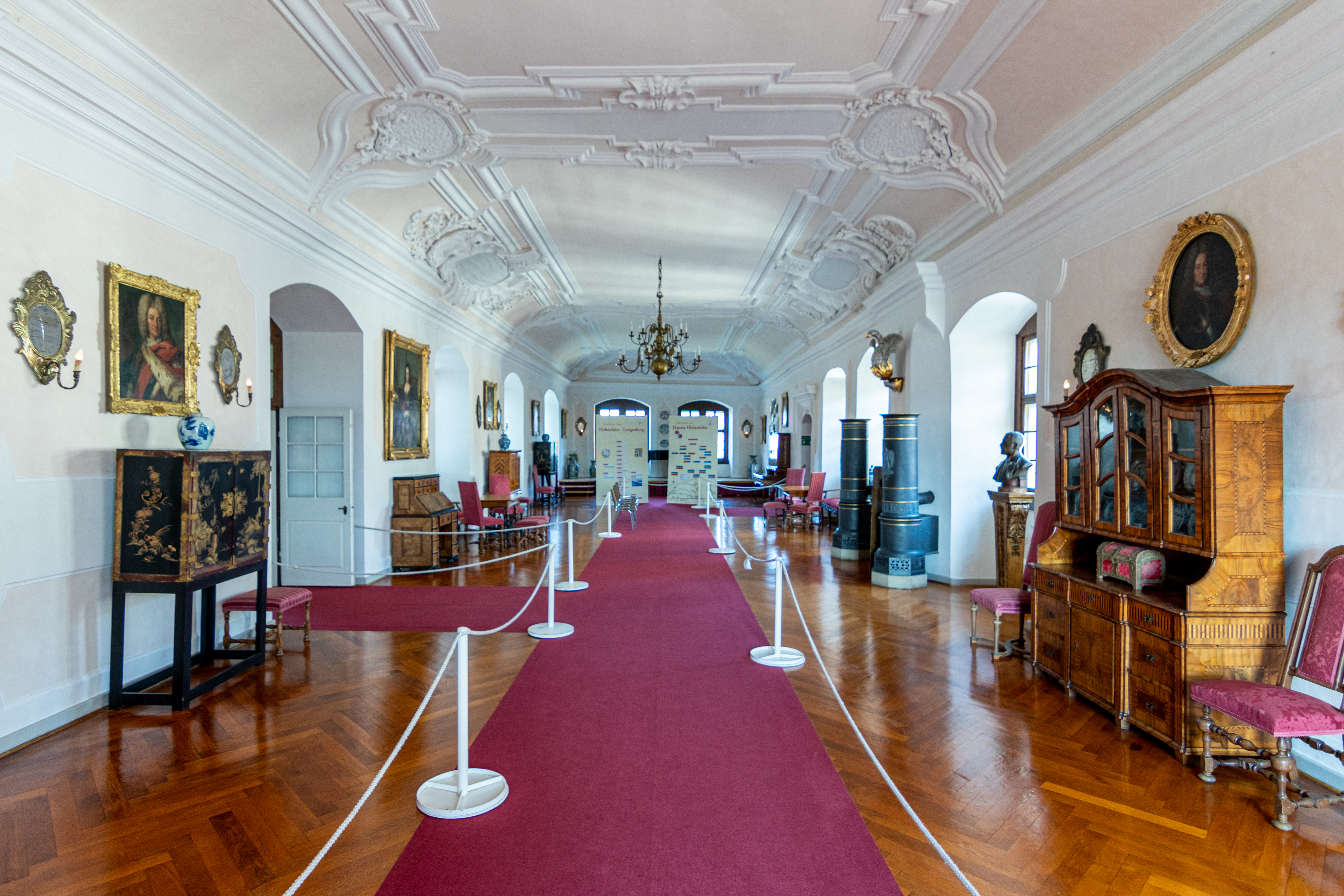 Barocksaal von Schloss Langenburg mit der Stuckdekoration aus dem Jahre 1686